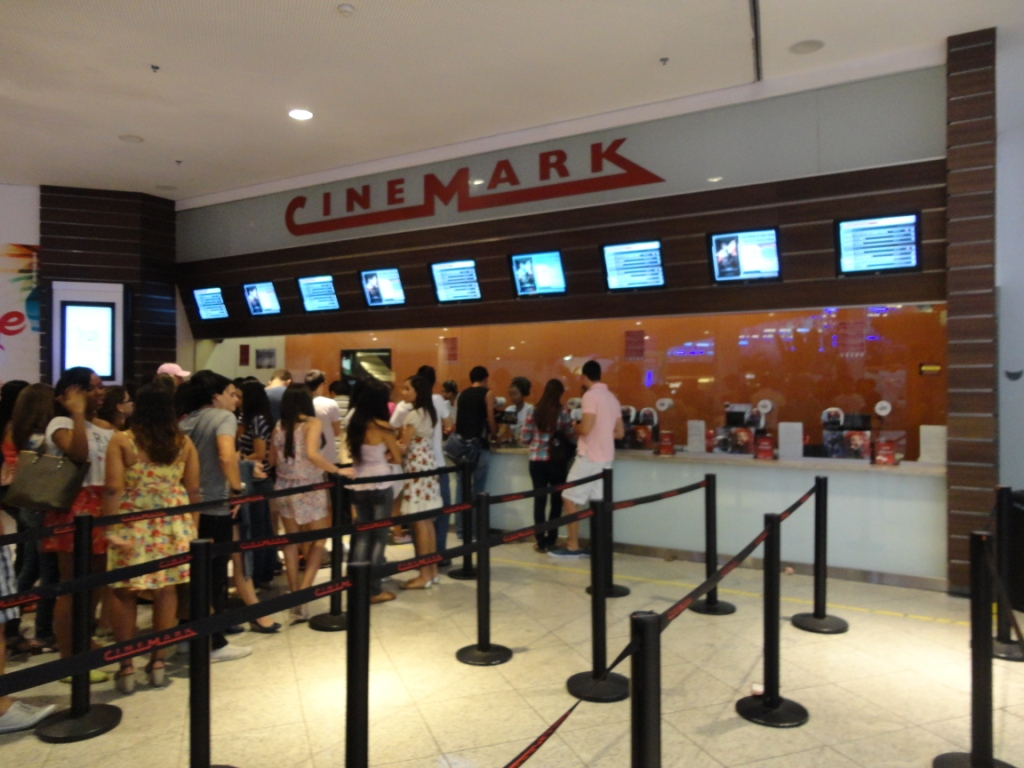 Bilheteria do Cinemark do Salvador Shopping, de Salvador, BA